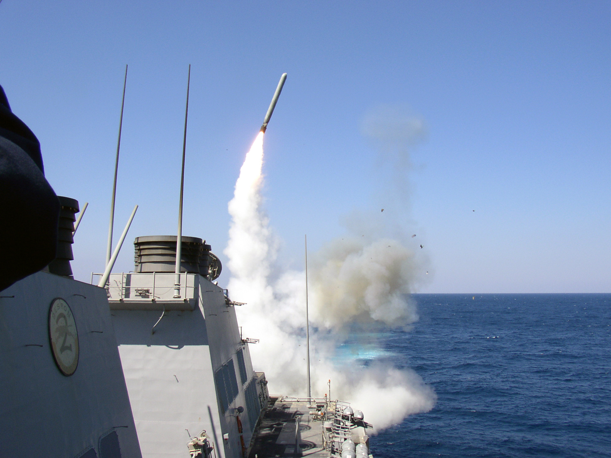 BGM-109 Tomahawk launch (DDG-78)